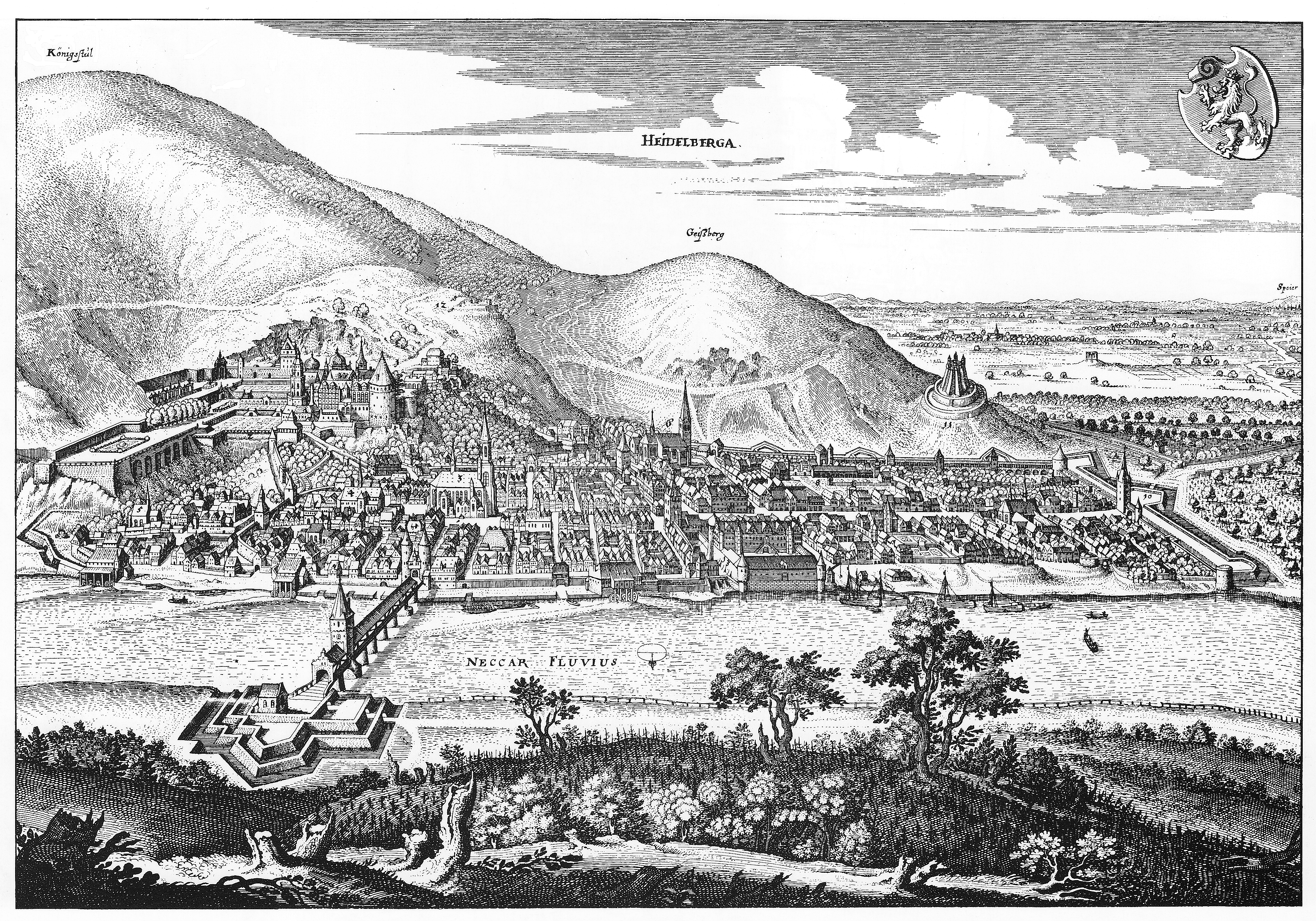 Ansicht von Heidelberg in einem Kupferstich Matthäus Merians